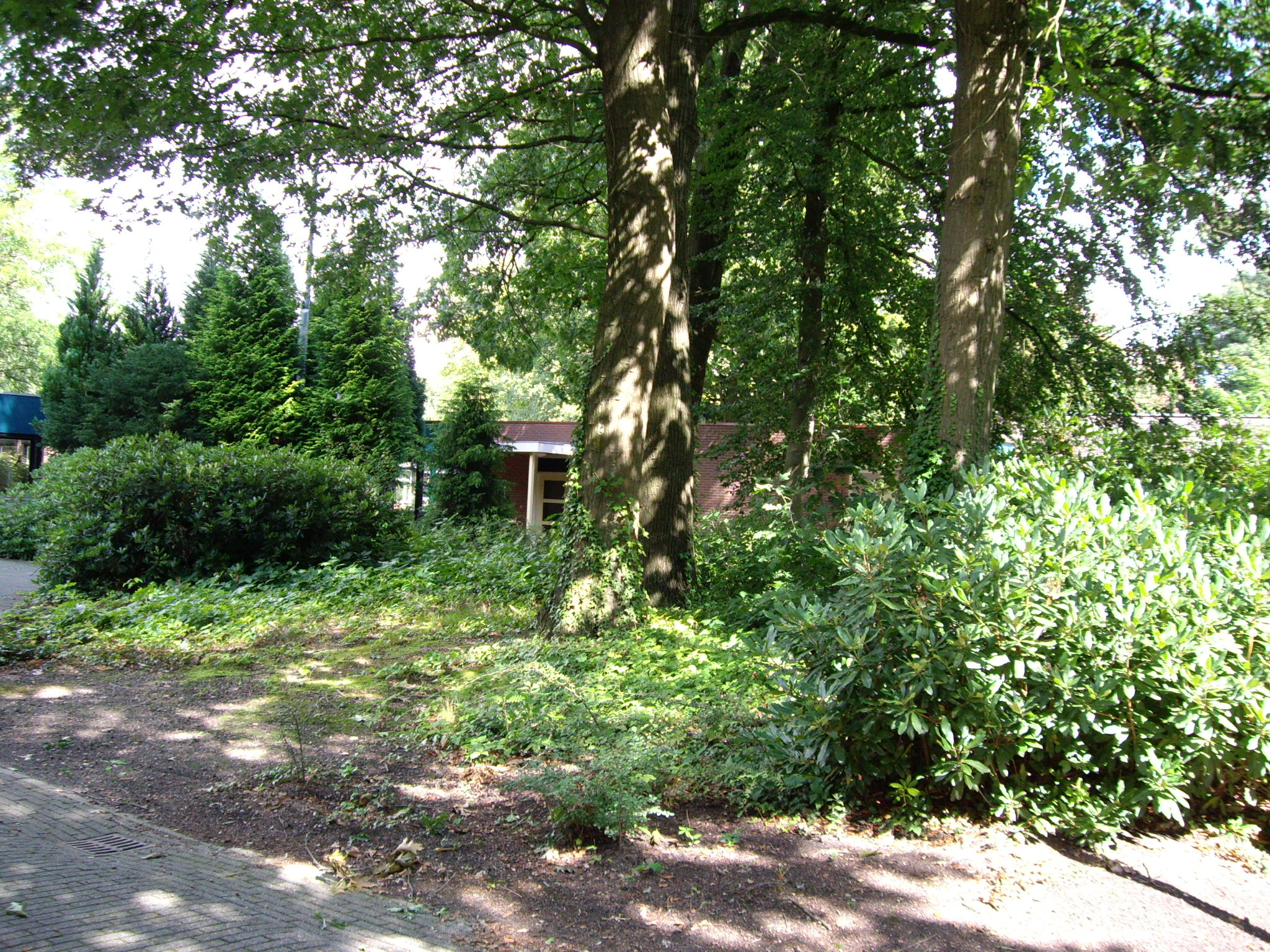 Groot Schuylenburg, christelijk centrum voor mensen met een verstandelijke beperking in Apeldoorn. Bij de nieuwbouw is zo veel mogelijk rekening gehouden met de monumentale bomen